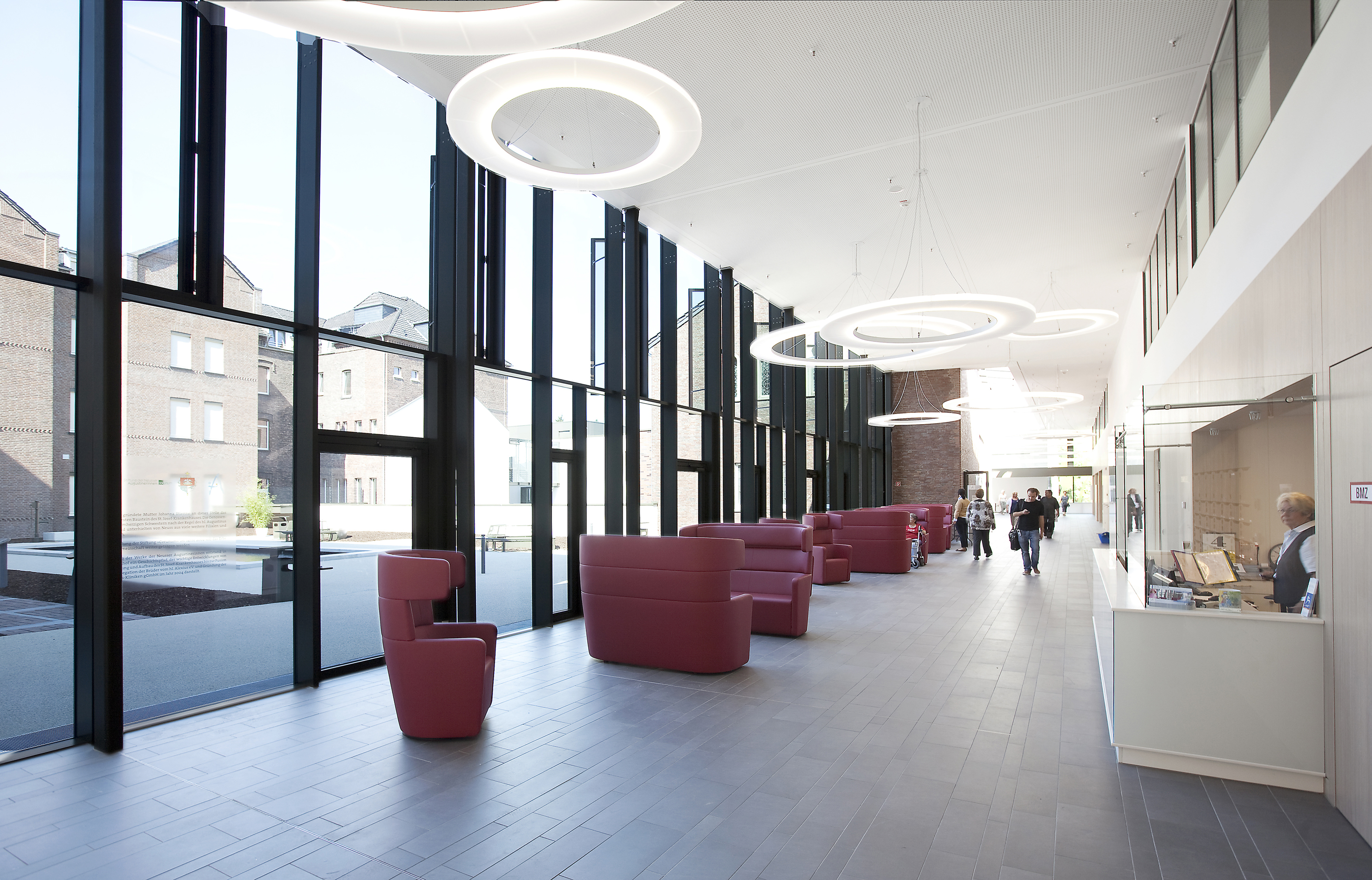 Eingangshalle des St. Alexius-/St. Josef Krankenhaus